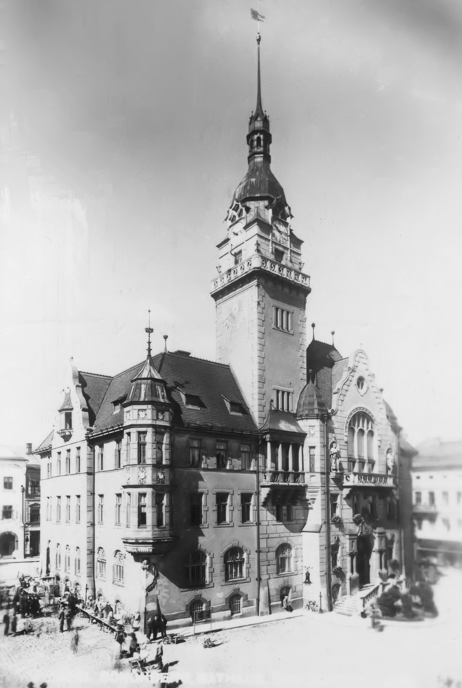 Mährisch-Schönberger Rathaus